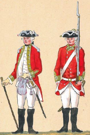 40. Regiment Pieszy Łanowy